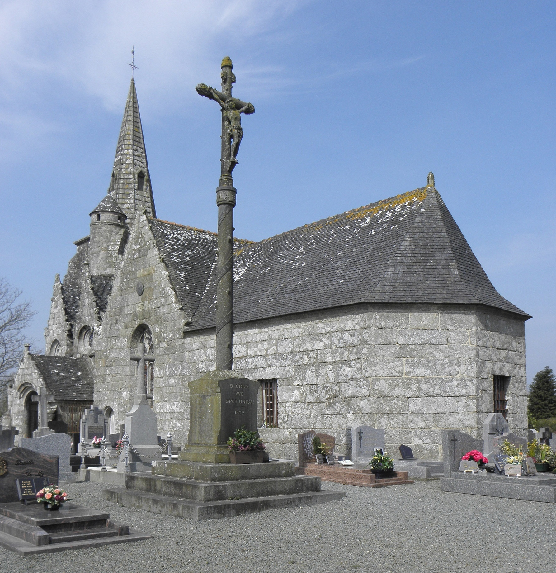 Flanc sud et chevet de l'église Saint-Gildas de Magoar (22).